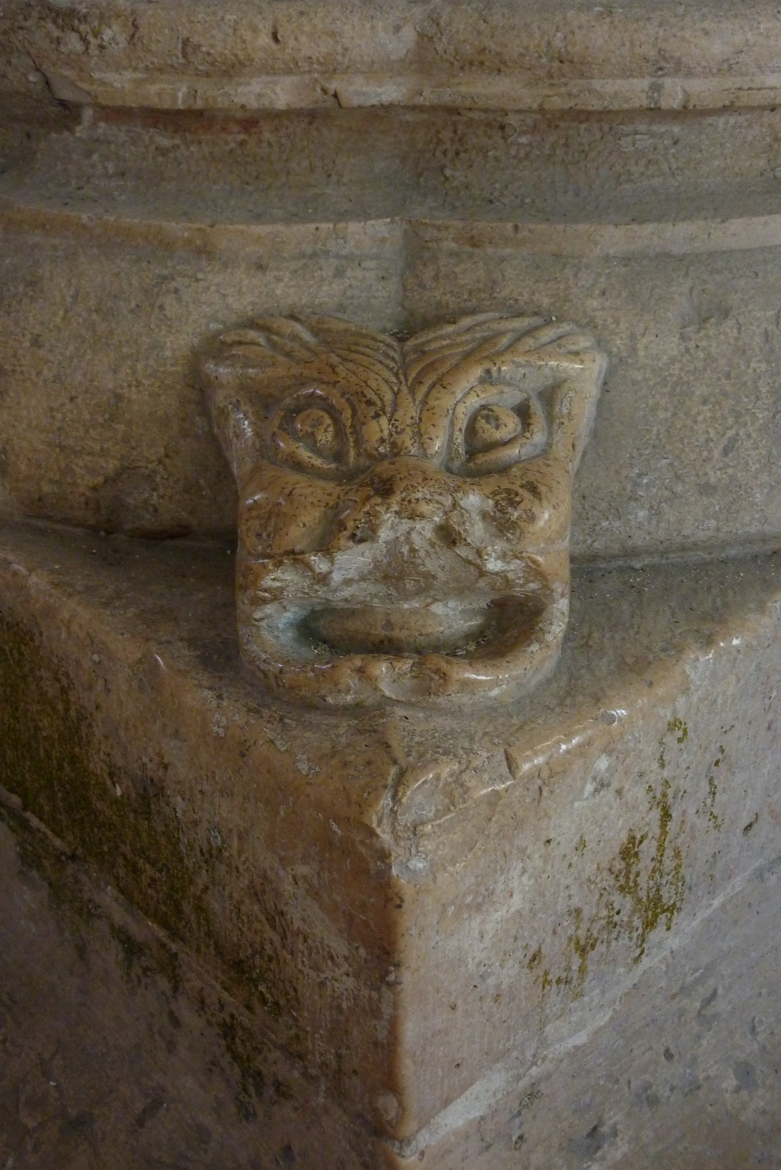 Katholische Kirche Notre-Dame in Château-Landon, einer Gemeinde im Département Seine-et-Marne (Île-de-France), Eckblatt aus dem 12./13. Jahrhundert